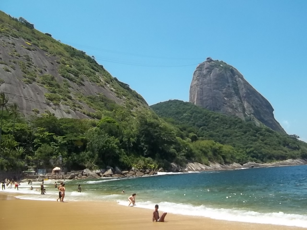 La playa Vermelha con vista parcial del morro Urca y el morro Pan de Azúcar.